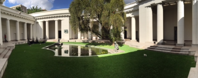 Patio central del edificio neoclásico del Museo de Bellas Artes de Caracas.